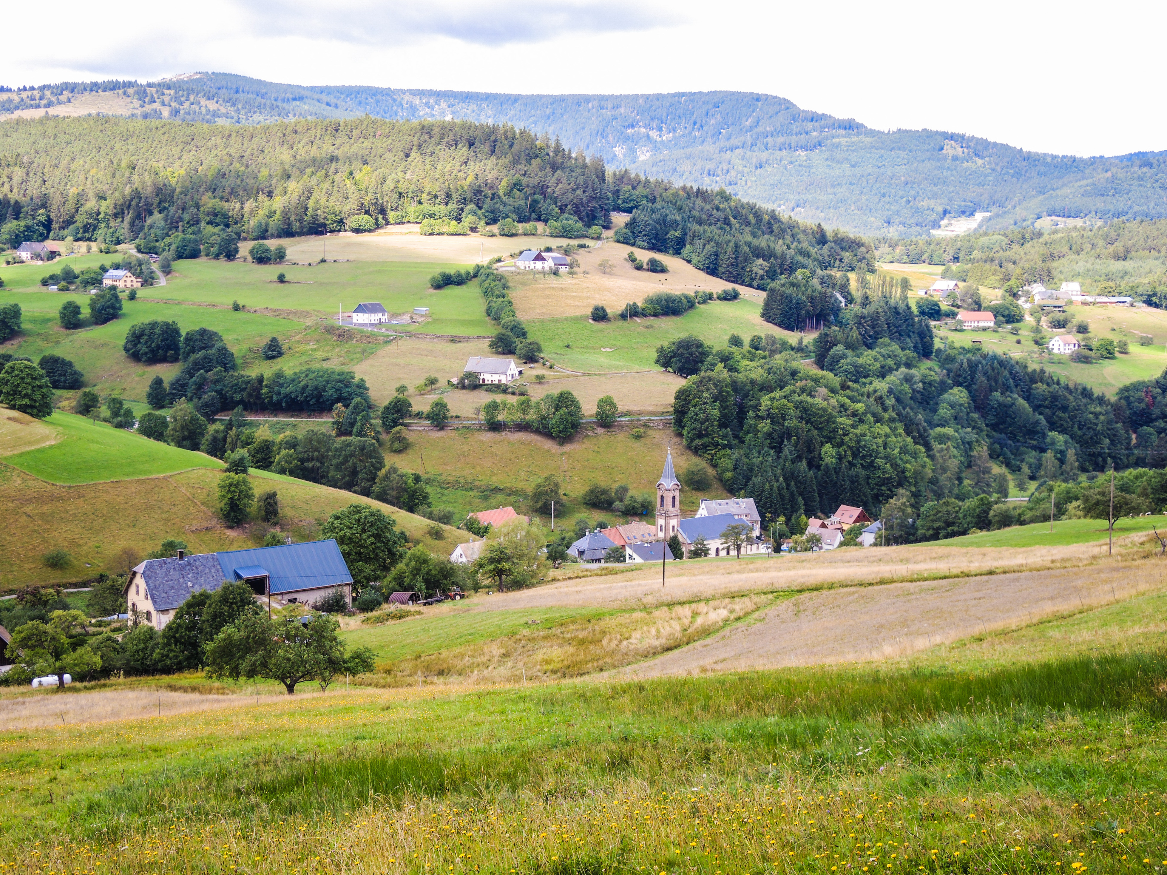 Vallée des Basses-Huttes, vue des hauteurs de Quimberg. Orbey. Haut-Rhin